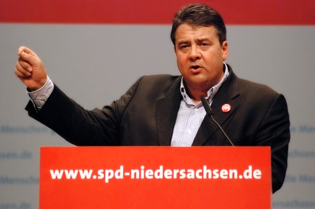 Sigmar Gabriel während einer Rede bei der Landesvertreterversammlung 2009 der SPD Niedersachsen, Deutschland